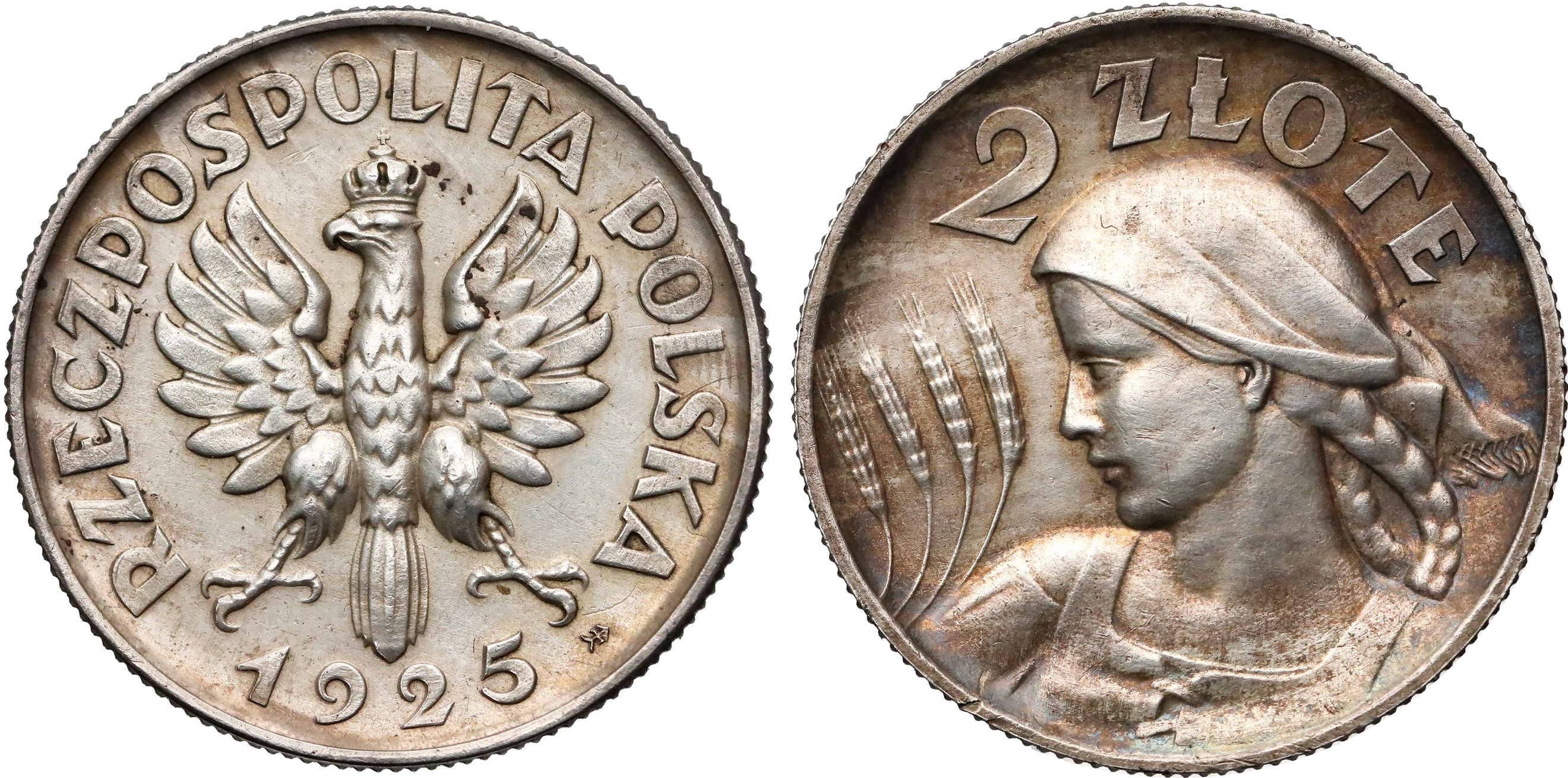 PRÓBA 2 złote 1925 Warszawa